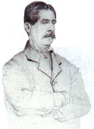 Dessin d'Alberto Urdaneta représentant Francisco Javier Cisneros